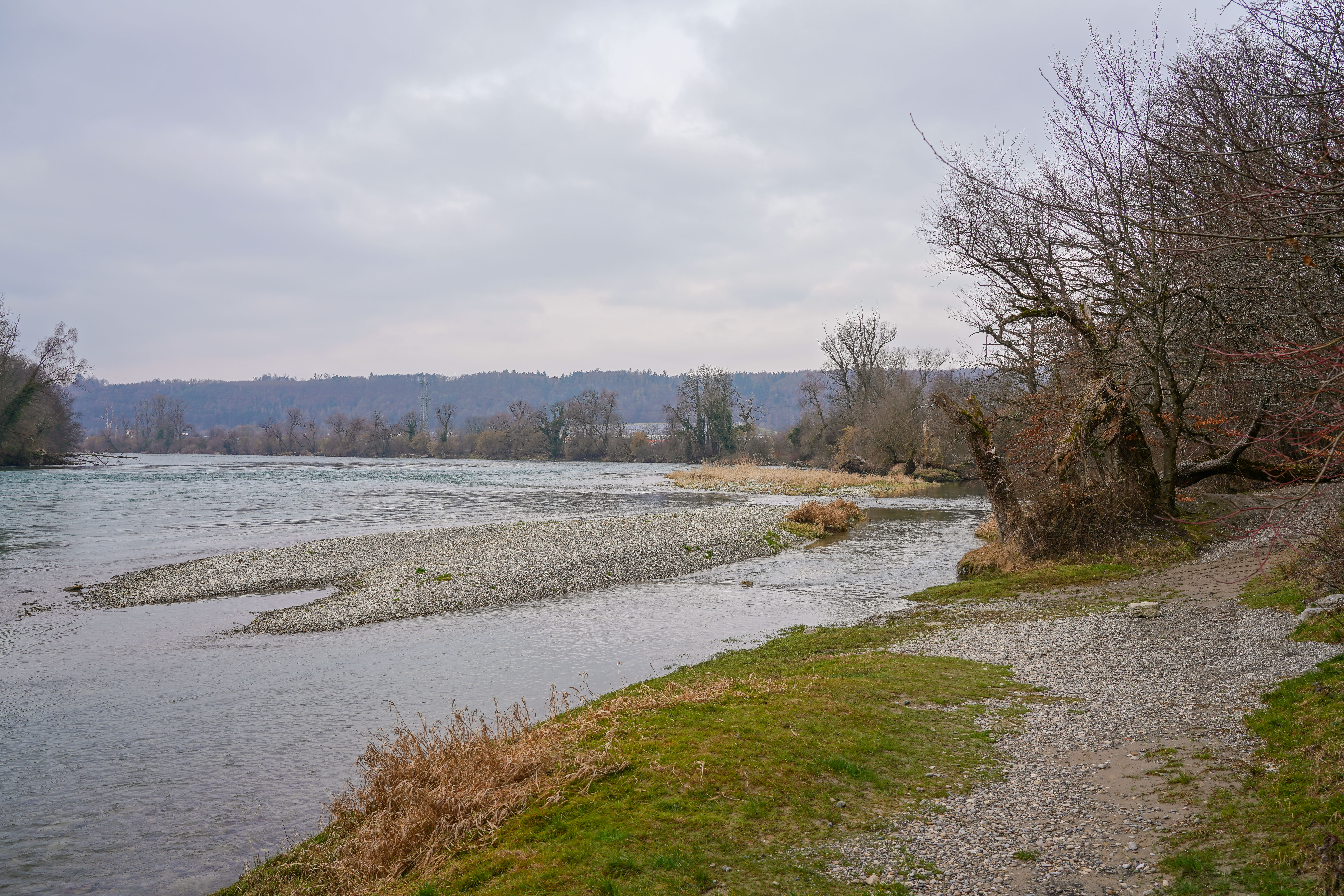 Naturschutzgebiet Kadelburger Lauffen-Wutachmündung